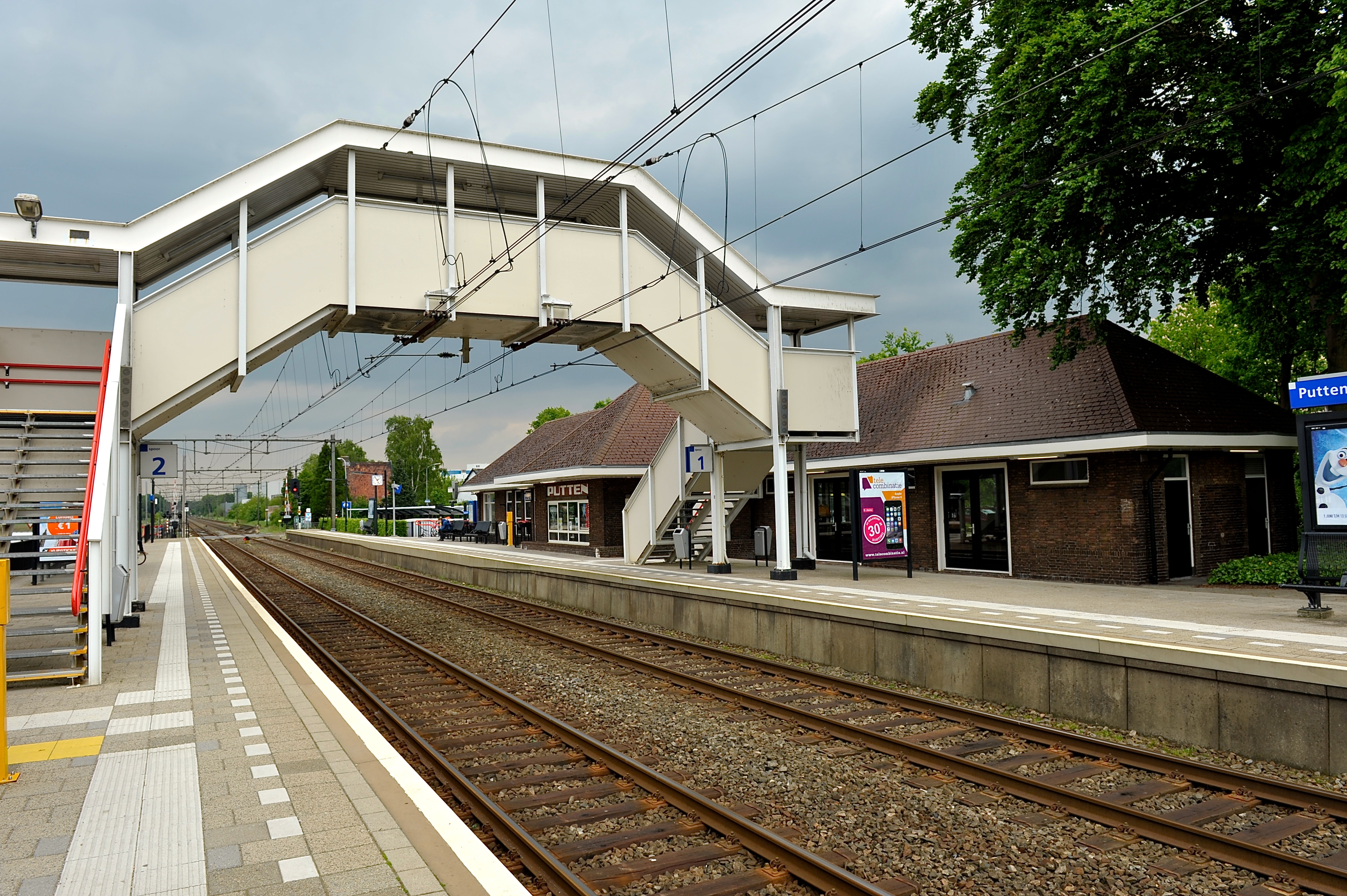 Het voormalige stationsgebouw van Putten is sinds een paar jaar omgebouwd tot 'Perron 127', een plek voor koffie en koek, vintage en zaaltjes voor vergaderingen en kleine voorstellingen. De trein (sprinter) stopt er overigens ook nog.